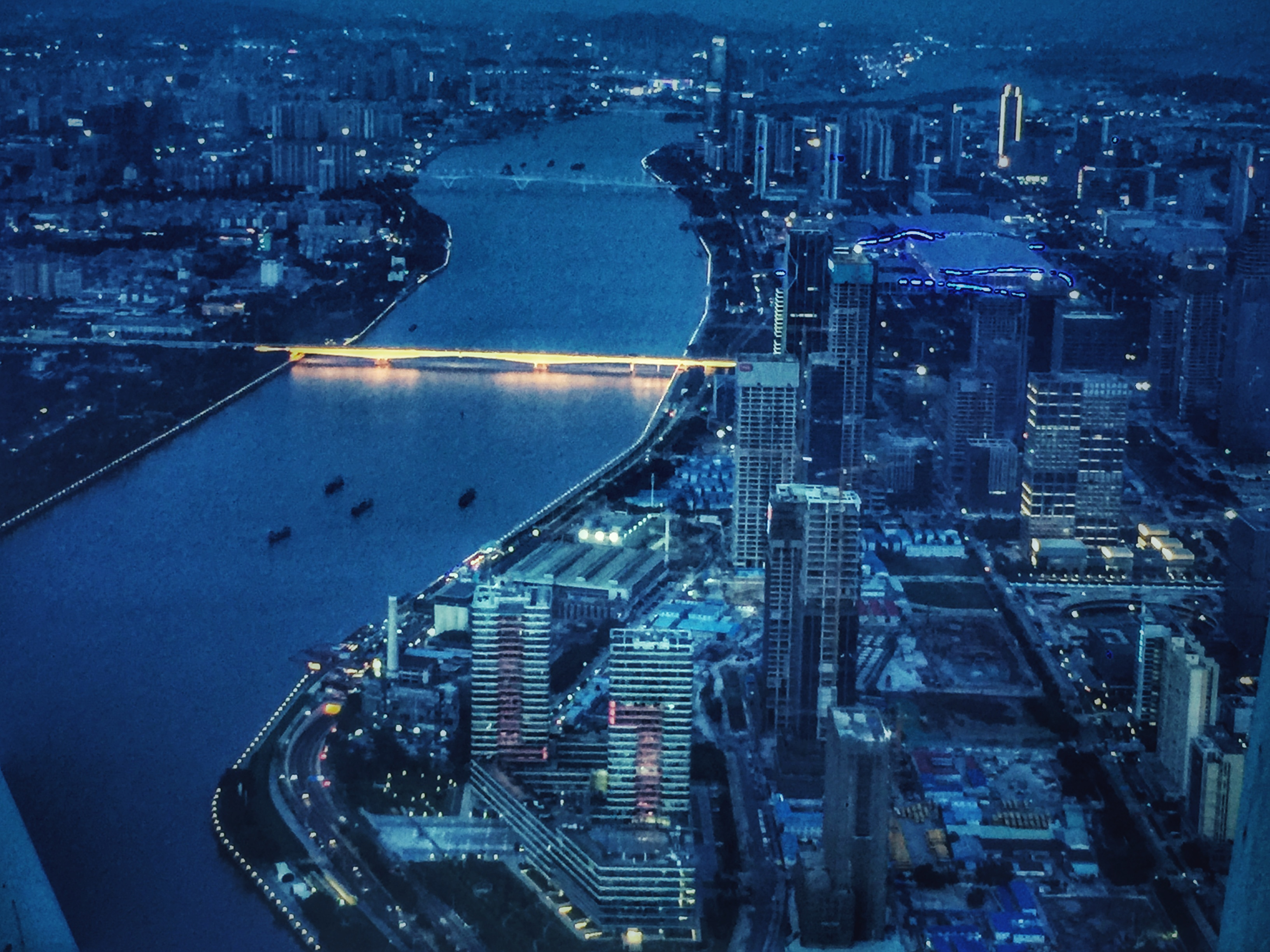 珠江和琶洲